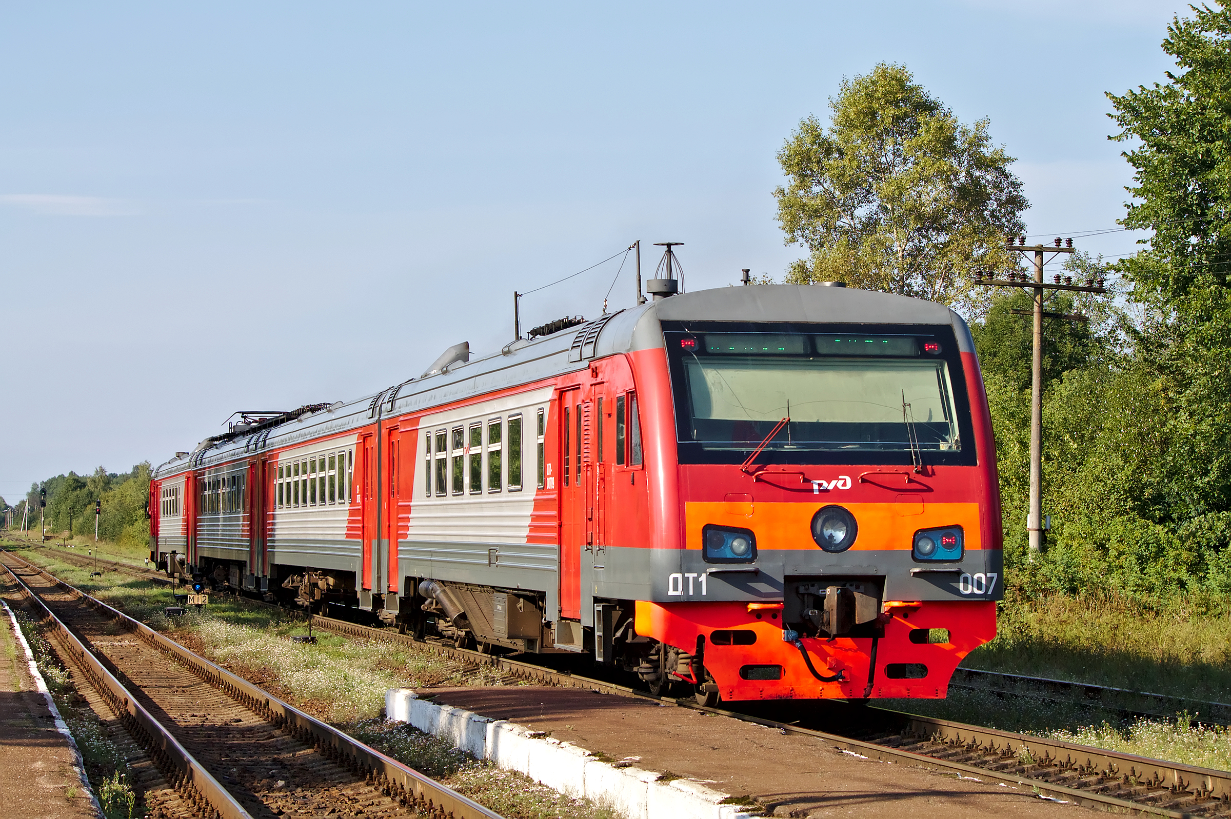 ДТ1-007, пригород Луга - Псков, станция Плюсса. см. фото 619074 в альбоме автора